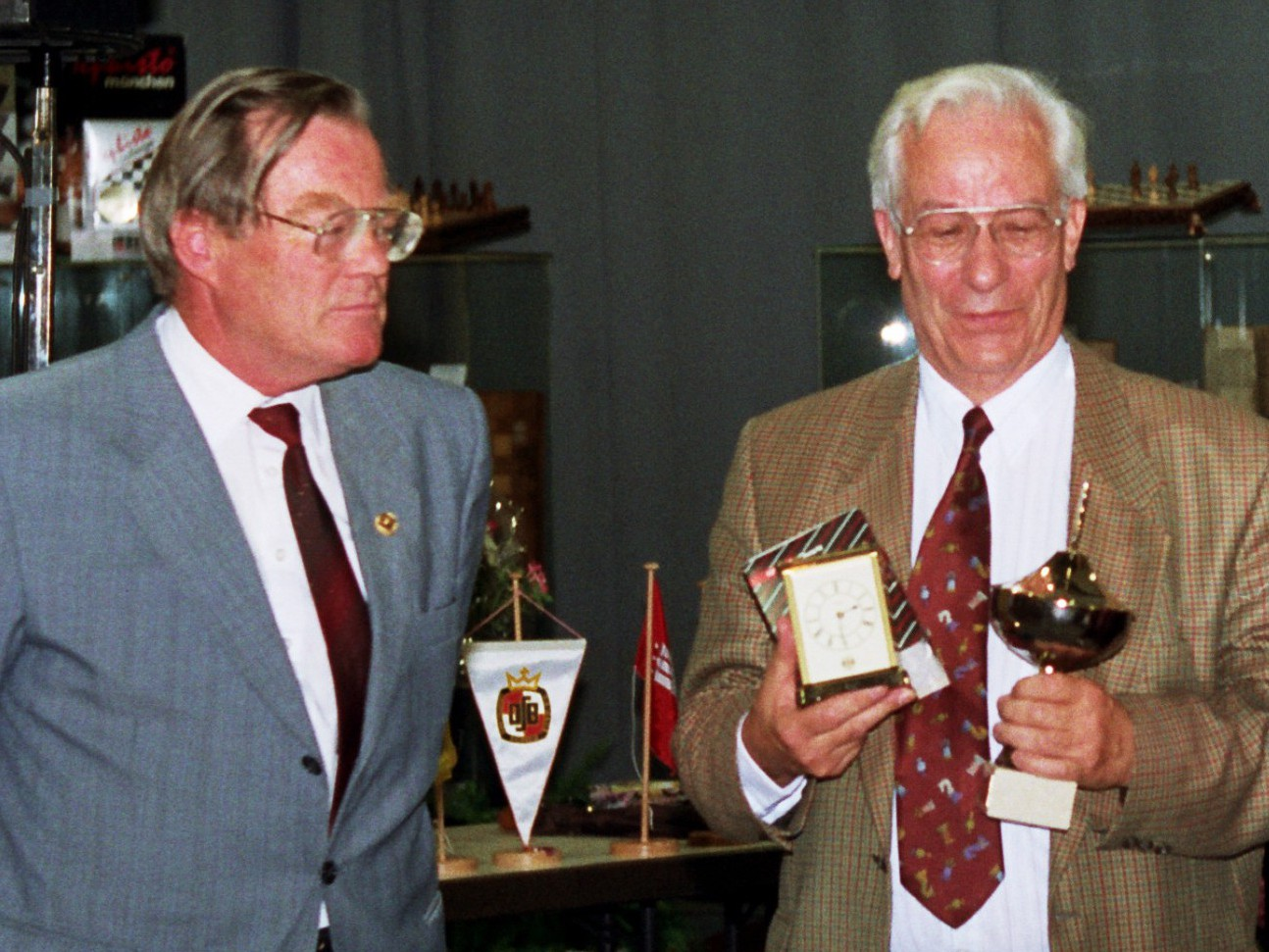 Klaus Gohde, langjähriger Seniorenreferent des Deutschen Schachbundes, und Gerhard Hund bei der Deutschen Schachmeisterschaft der Senioren 1995 in Oldenburg.